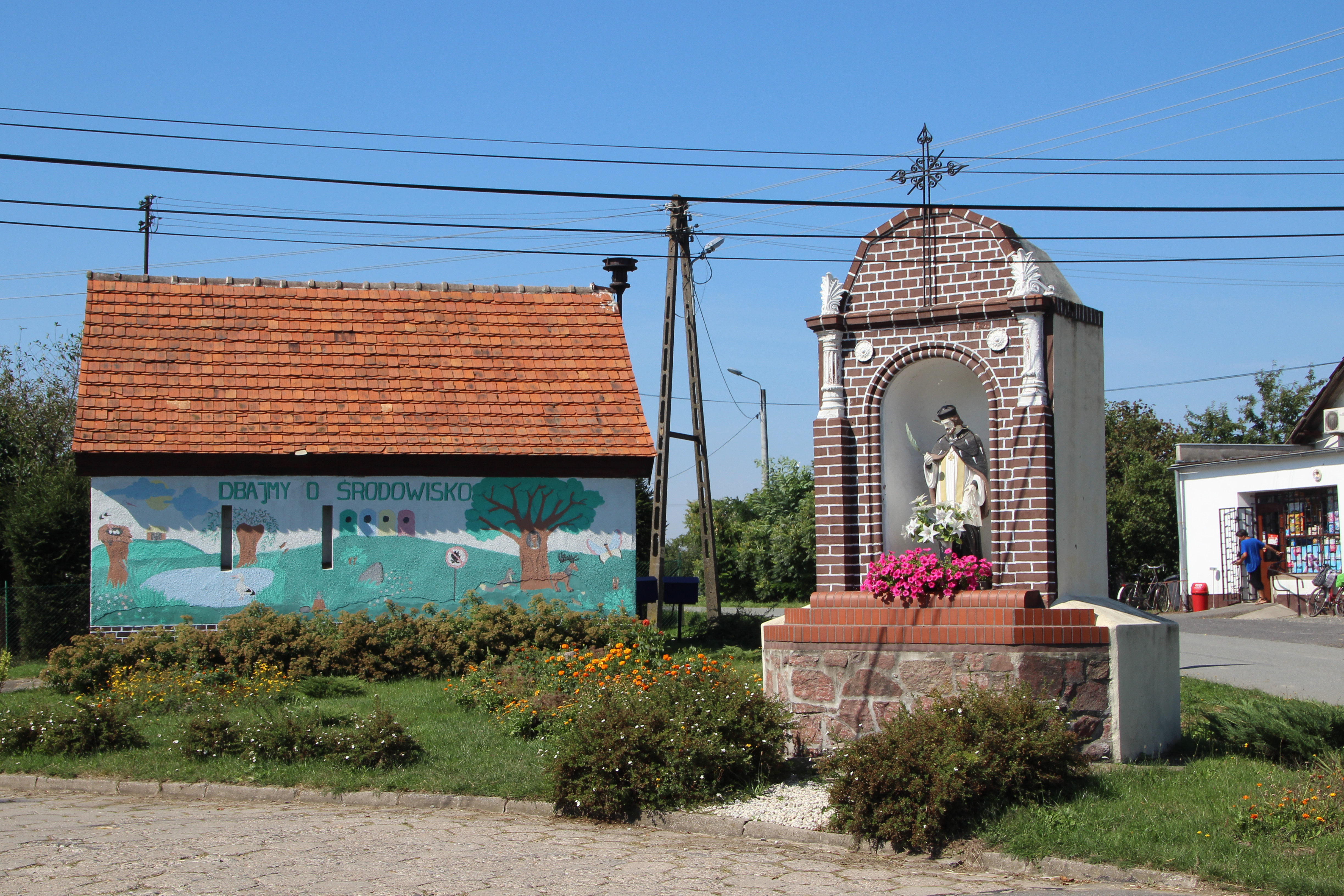 Puszyna – wieś w Polsce położona w województwie opolskim, w powiecie nyskim, w gminie Korfantów.